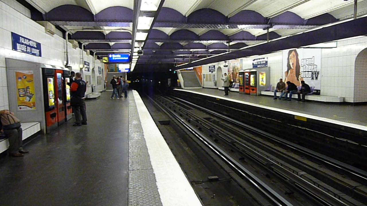 Station Palais Royal - Musée du Louvre, ligne 1 du métro de Paris, France.